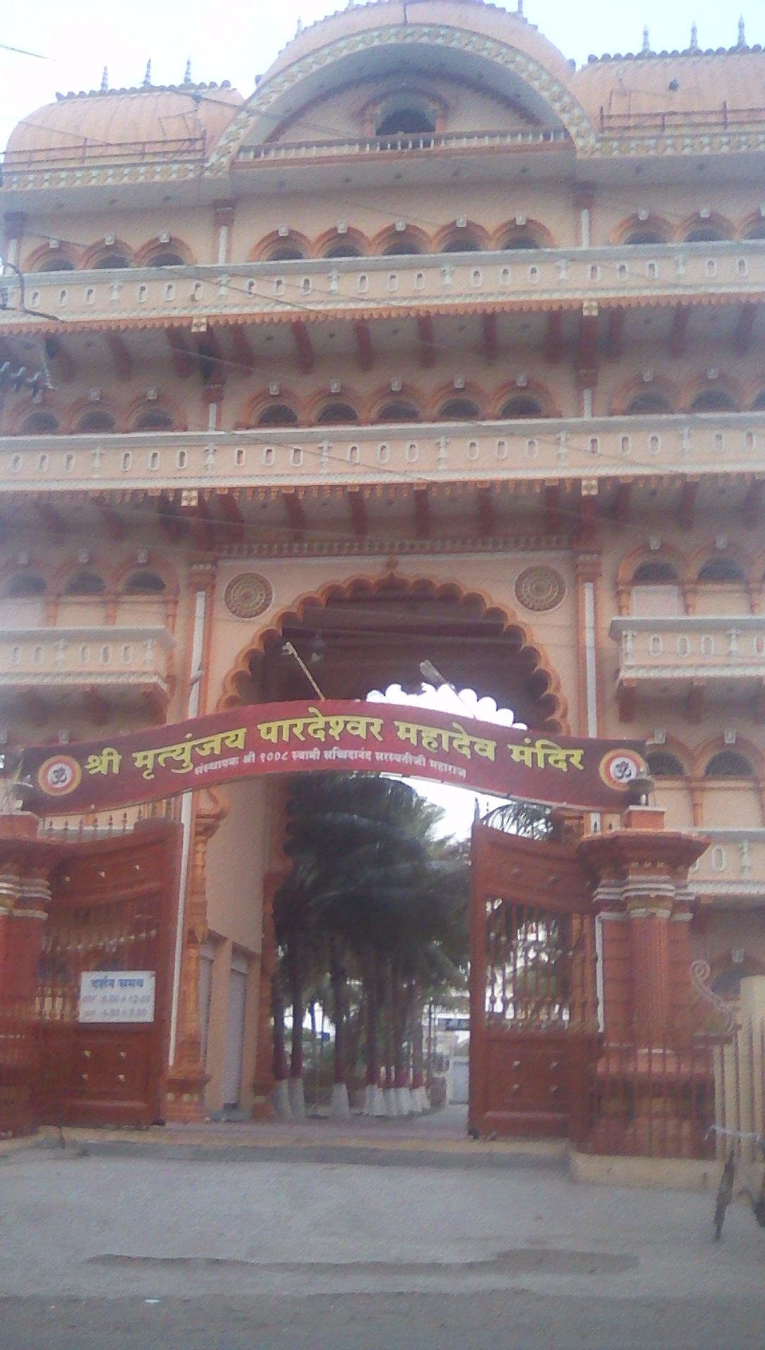 पार्धेश्वर महादेव मंदिर परभणी